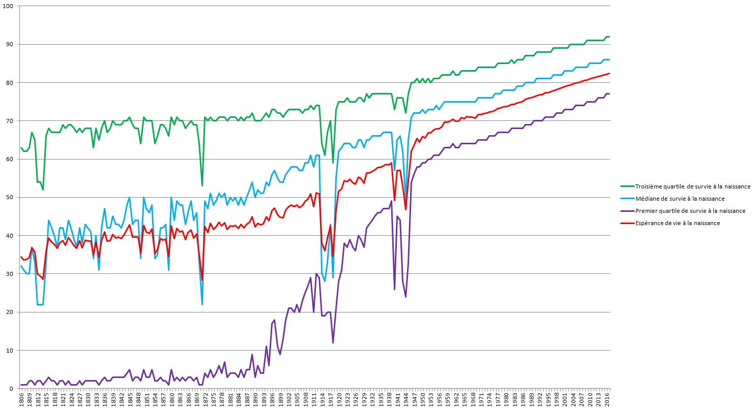 Évolution de l'espérance de vie et des quartiles de survie à la naissance en France de 1806 à 2017 (Source: INED) Définitions: - Espérance de vie à la naissance: âge moyen de décès. - Premier quartile de survie à la naissance: âge à partir duquel 25% de la population est morte. - Médiane de survie à la naissance: âge à partir duquel 50% de la population est morte. - Troisième quartile de survie à la naissance: âge à partir duquel 75% de la population est morte.